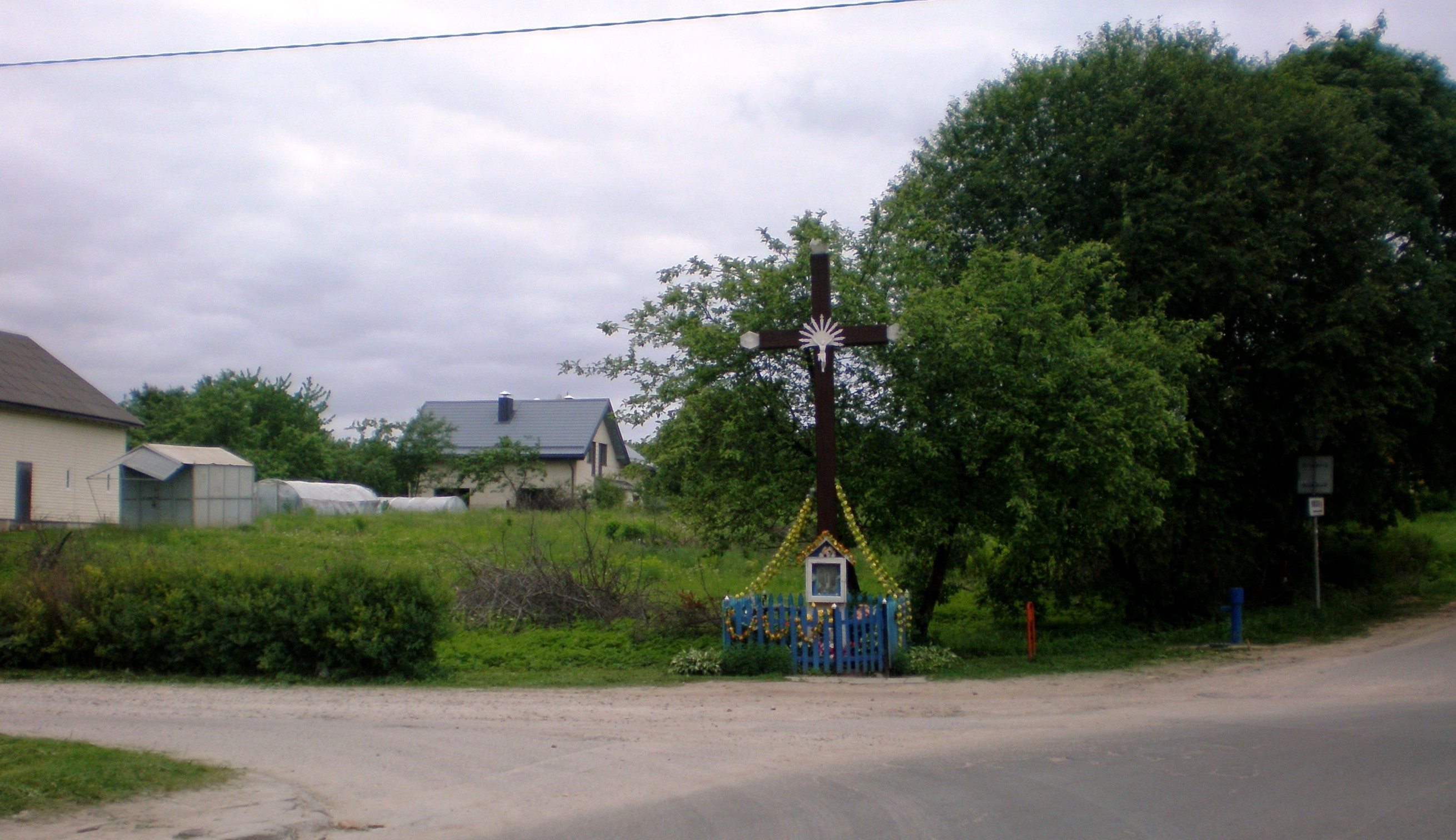 Kryžius Kalno gatvėje, Uosių/Rokantiškių sodai, Vilnius